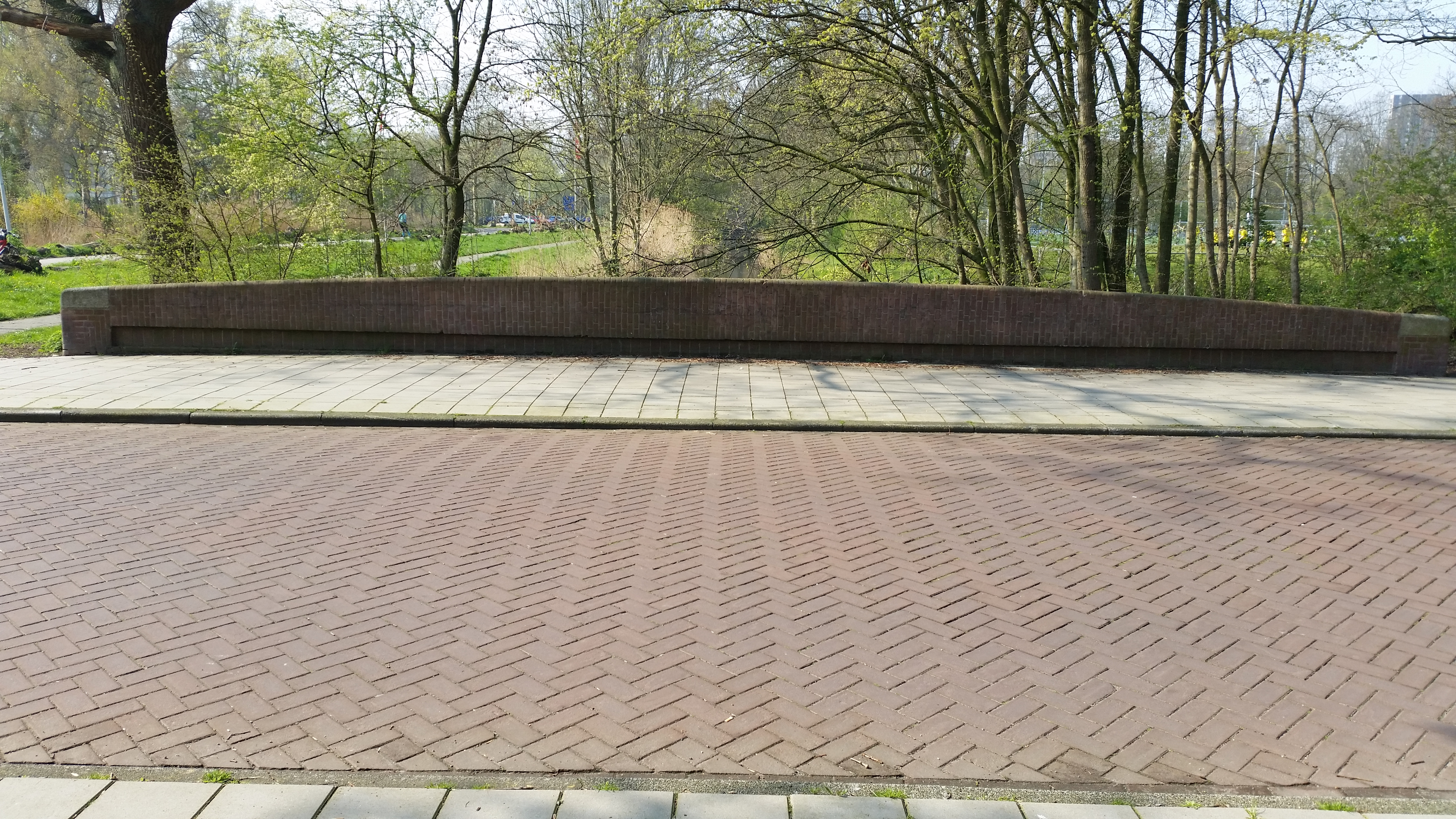 Brug 267 (in Amsterdam)